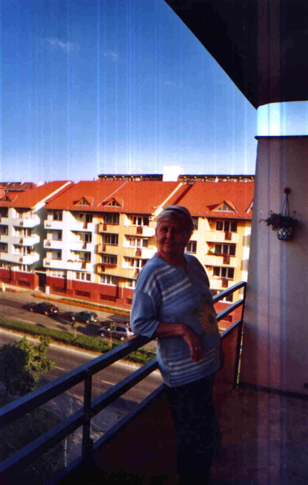 Budapest XX. District